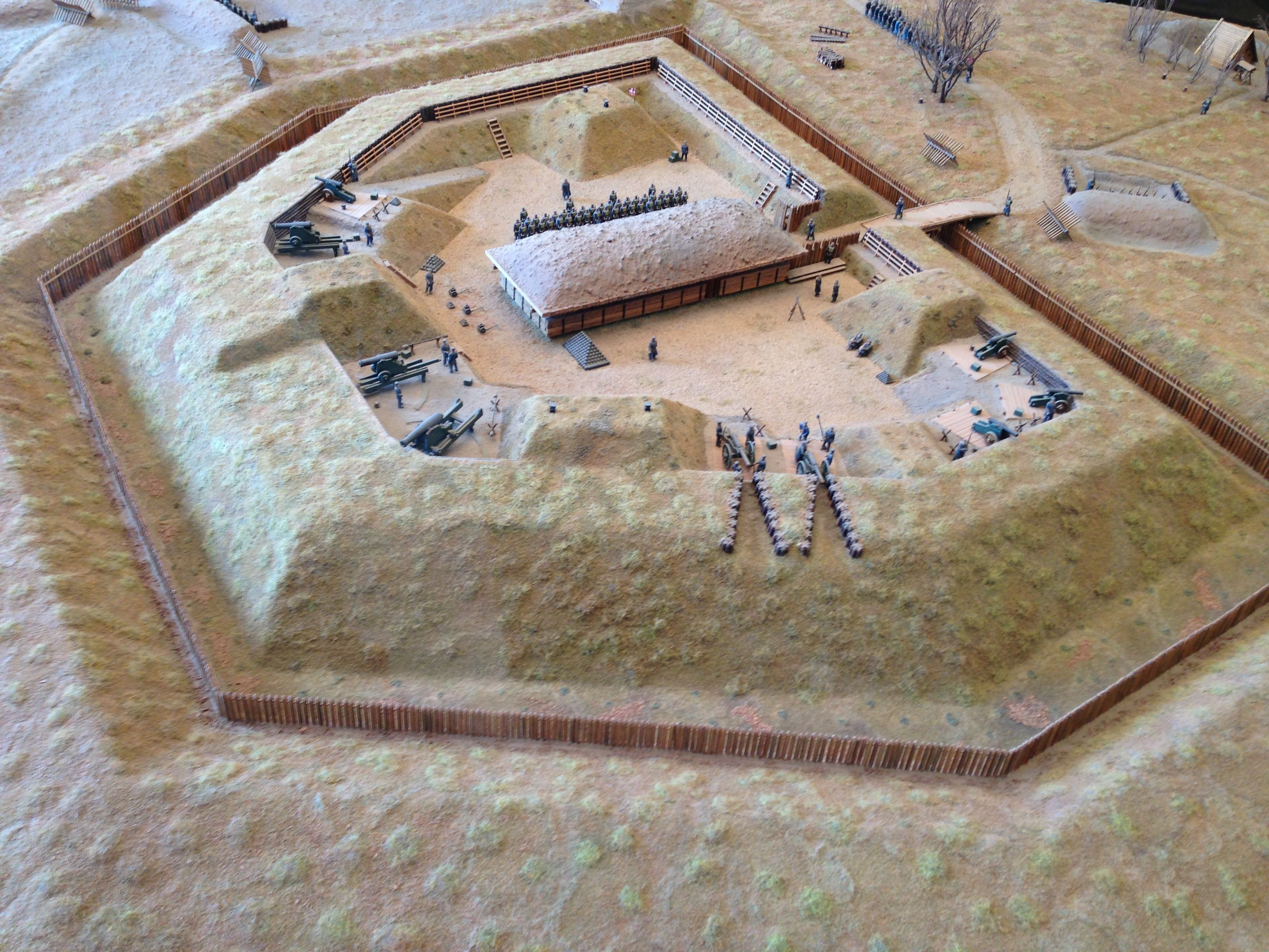 Modell Wehranlage Düppeler Schanzen im dänischen Nationalmuseum Dybbøl Mølle